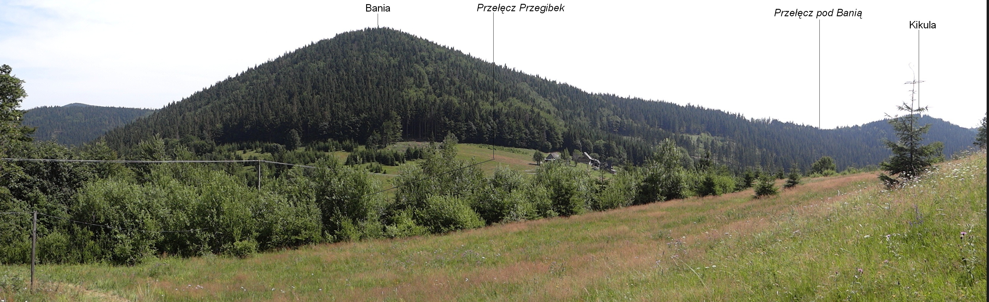 Widok z osiedla Przegibek